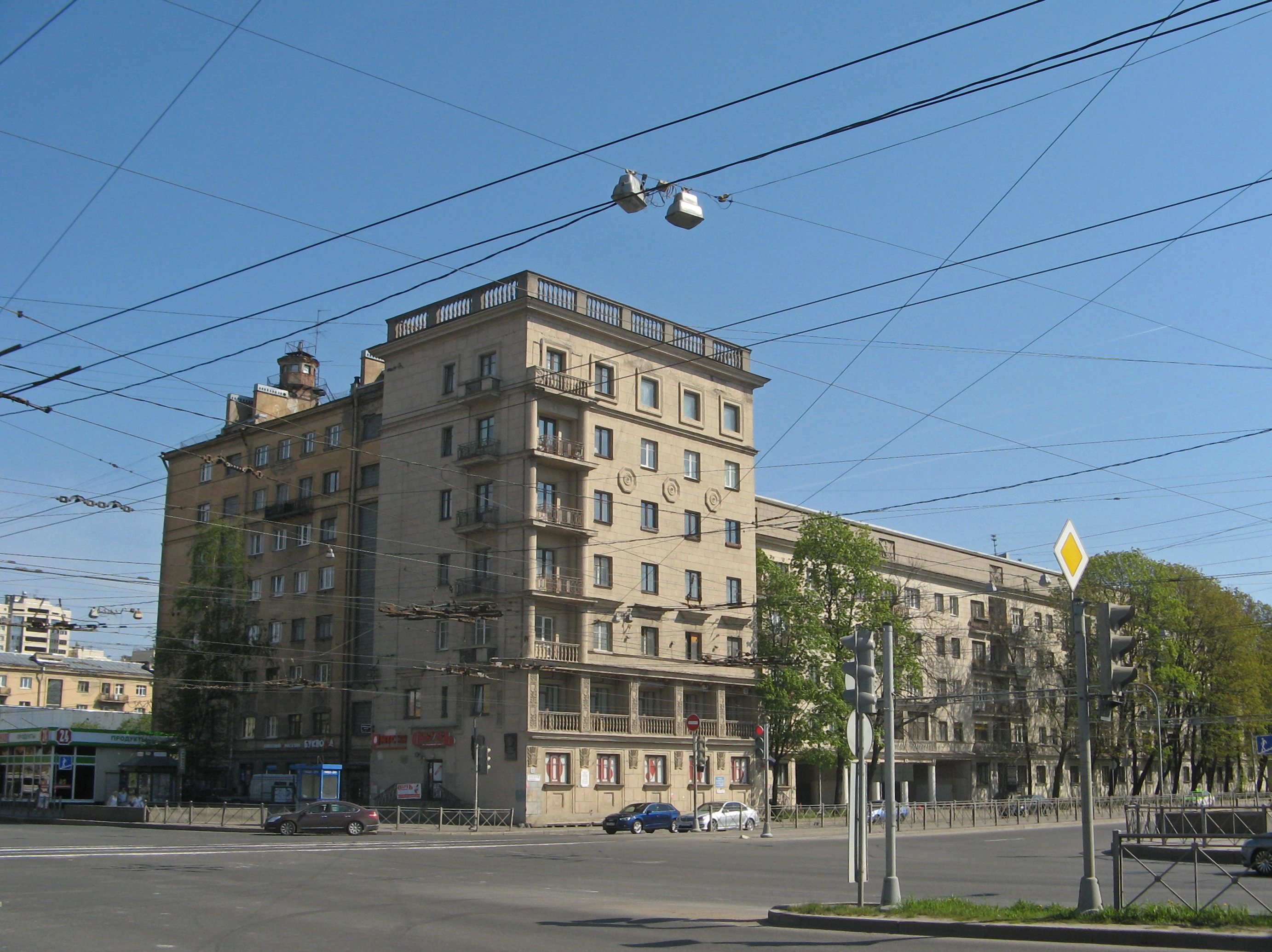 'Дом специалистов'. Дом, в котором жили радиотехник М.А. Бонч-Бруевич и химик В.Г. Хлопин: Лесной проспект, 61, Выборгский район, Санкт-Петербург